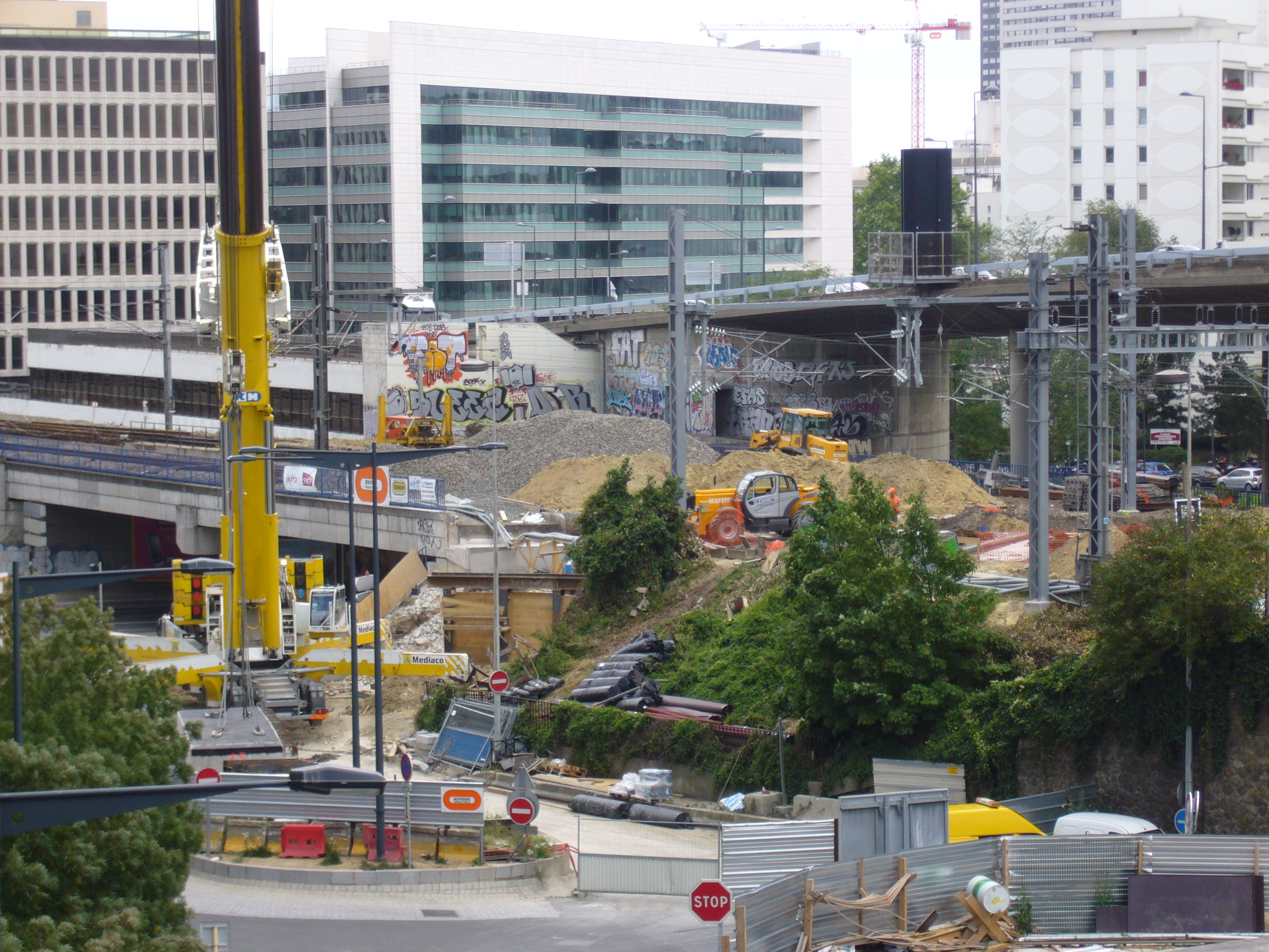 Travaux de prolongement du T2 vers Pont de Bezon.